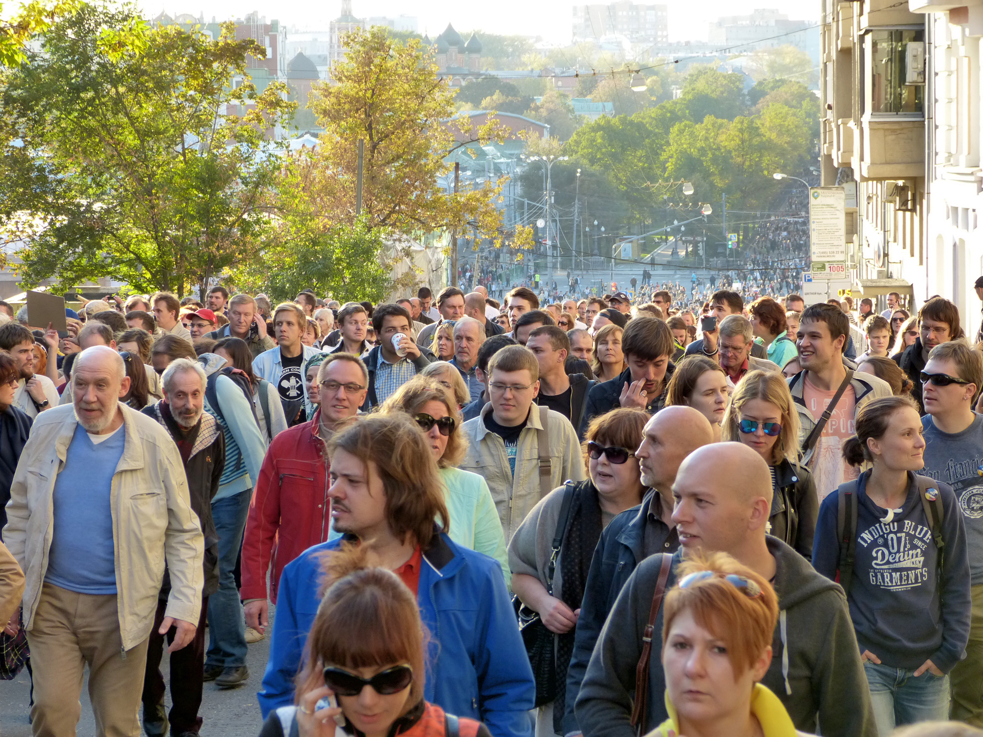 Грандиозный ОБЩЕРОССИЙСКИЙ МАРШ МИРА — против вторжения войск путинского режима на Украину, против сатанинской лжи путинской пропагандистской машины, разжигающей ненависть между людьми, народами, странами. Москва, Бульварное кольцо, 21 сентября 2014 года. Все, кто был на этом шествии (а также многочисленные полицейские), знают, что путинская пропаганда солгала, сказав, что в шествии участвовало пять тысяч человек. Наиболее правдоподобная цифра — от 100 тысяч до 200 тысяч человек. Я шёл где-то в середине колонны по внешней стороне Бульварного кольца. Как далеко была голова колонны, я не знаю, мне её не было видно. Также не знаю, как далеко был хвост колонны. На этом кадре — то, что я видел позади себя. То, что я видел впереди себя, смотрите здесь и здесь. Примите во внимание, что ещё одна такая же колонна шла по другой стороне Бульварного кольца. Весьма часто на подобных акциях можно встретить известных людей. Например, в этот кадр случайно попал Георгий Александрович САТАРОВ (на фото слева). А вот на этом кадре можно увидеть Андрея Борисовича ЗУБОВА. А здесь — Лев ПОНОМАРЁВ и Марк УРНОВ. . . . . . . . . . .Возможно, главный морально-этический, правовой и политический вопрос нашего времени — возвращать ли Крым Украине? Об этом рассуждает в своей обстоятельной статье Андрей Николаевич ИЛЛАРИОНОВ — бывший советник Путина.